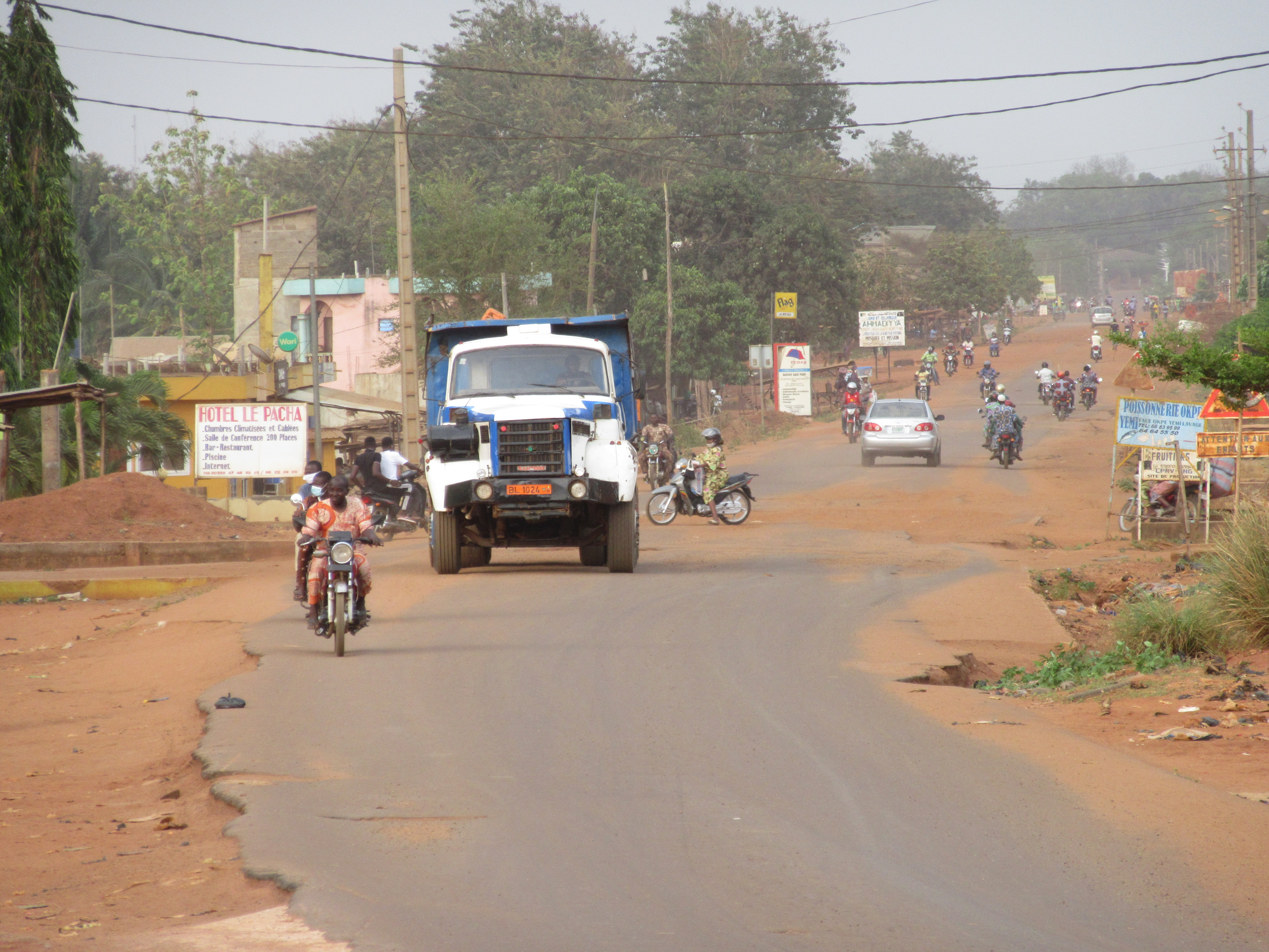 le transport à Pobé, Bénin This is an image with the theme "Africa on the Move or Transport" from: Benin